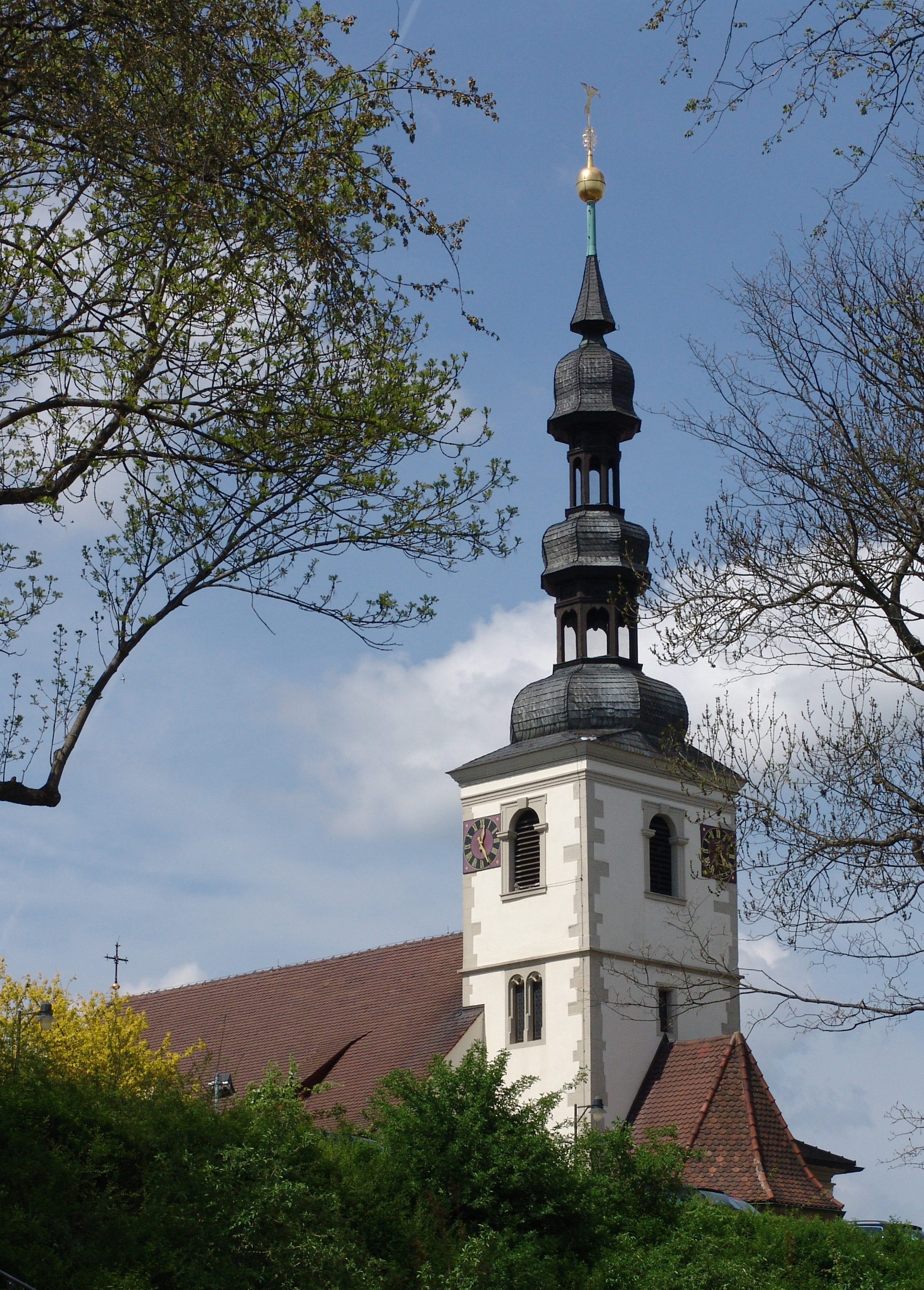 St. Salvator